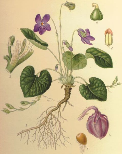 Viola odorata 1. blommande stånd med vårblommor och revor 2. tvenne avskurna bladskaft och deras stipler samt en kleistogam blomma i nedre bladvinkeln (3/1) 3. den kleistogama blommans pistill (15/1) 4. en av dess ståndare (15/1) 5. fruit (3/1) 6. seed (5/1).